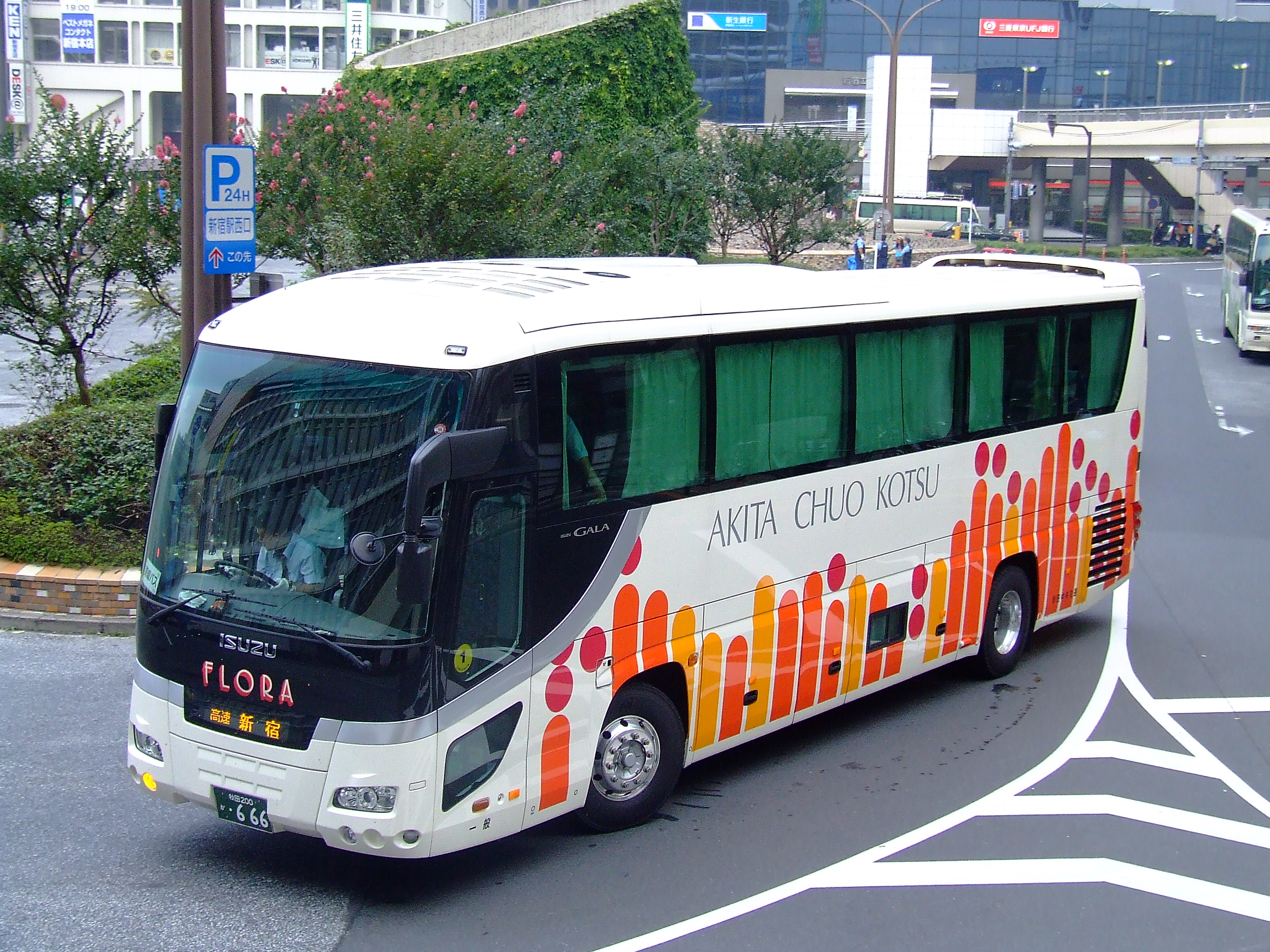 秋田中央交通の夜行高速バス「フローラEX号」新宿駅西口にて